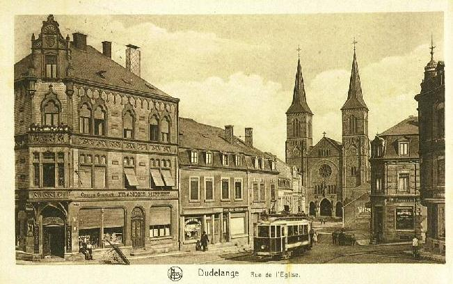 Dudelange, le Minettstram dans la rue de l'Église. Carte postale Edition E. A. Schaack.